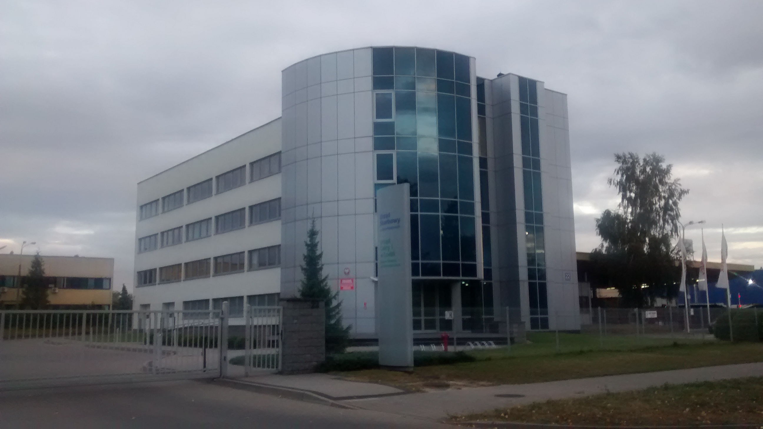 Urząd Skarbowy i Celny w Skierniewicach